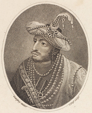 Tipu Sultan, c.1790